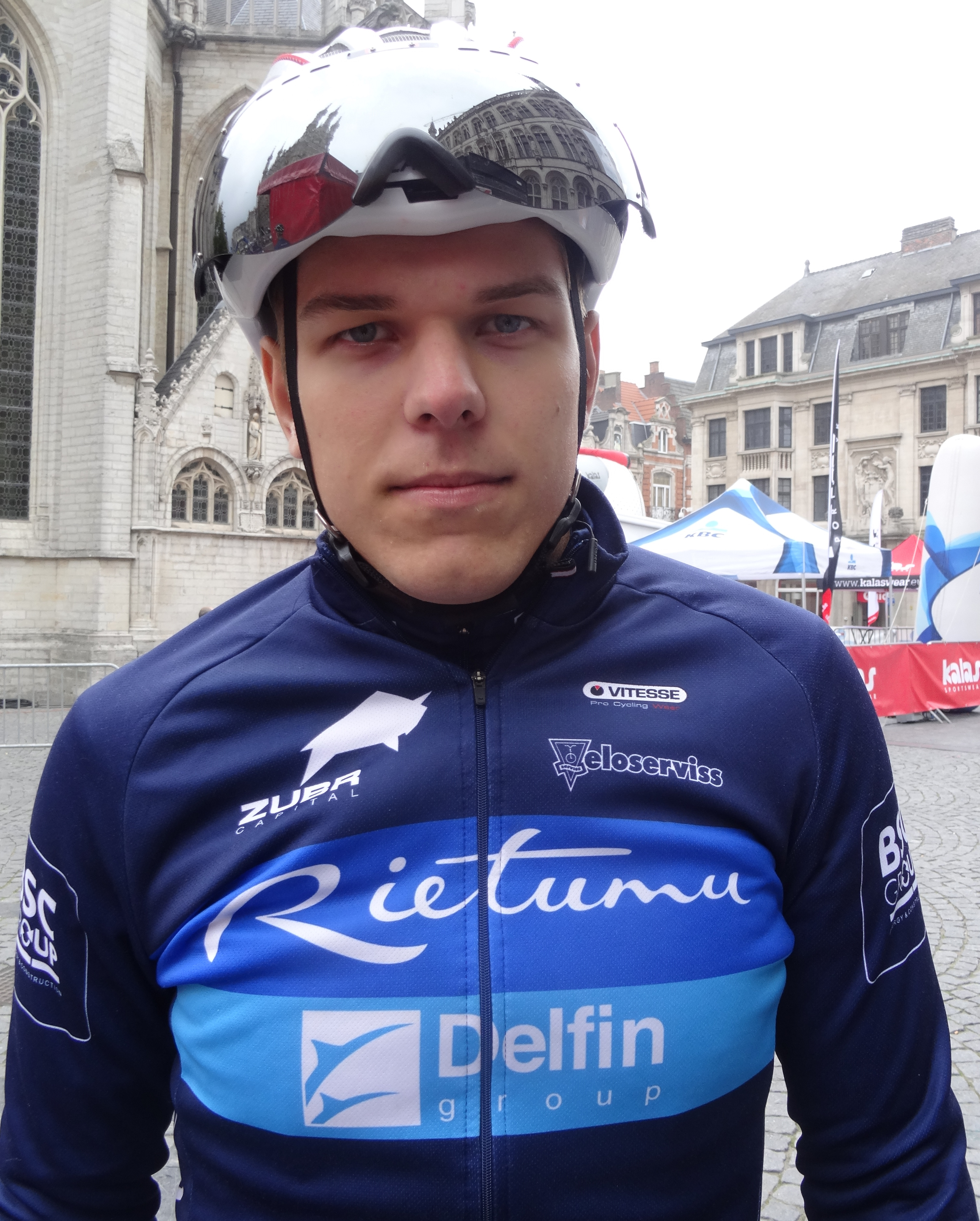 Reportage photographique réalisé le dimanche 14 septembre à l'occasion du départ et de l'arrivée du Grand Prix Jef Scherens 2014 à Louvain, Belgique.